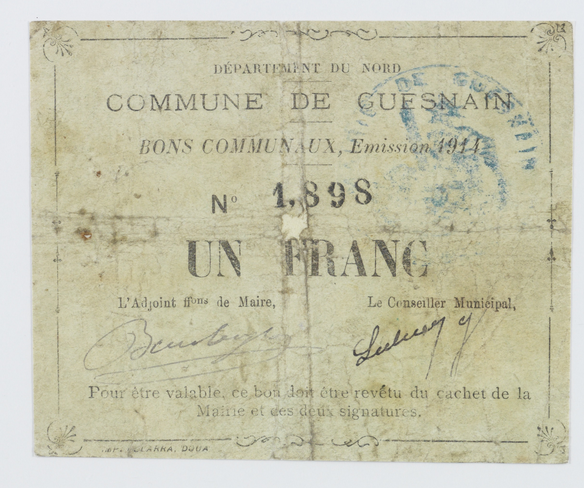 Bon communal d’un franc de la ville de Guesnain (Nord) Emission 1914, n°1898